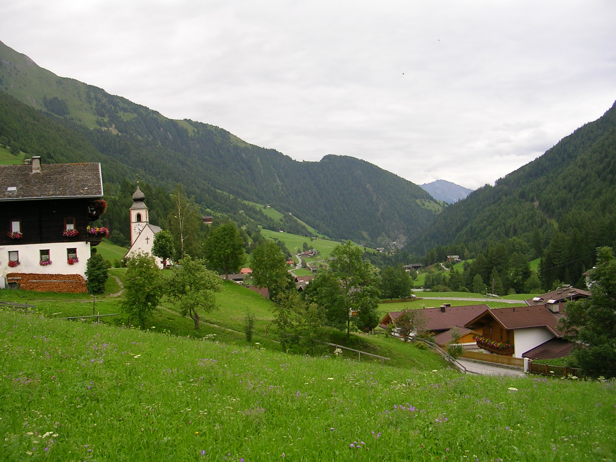 Prägraten am Großvenediger with parish church